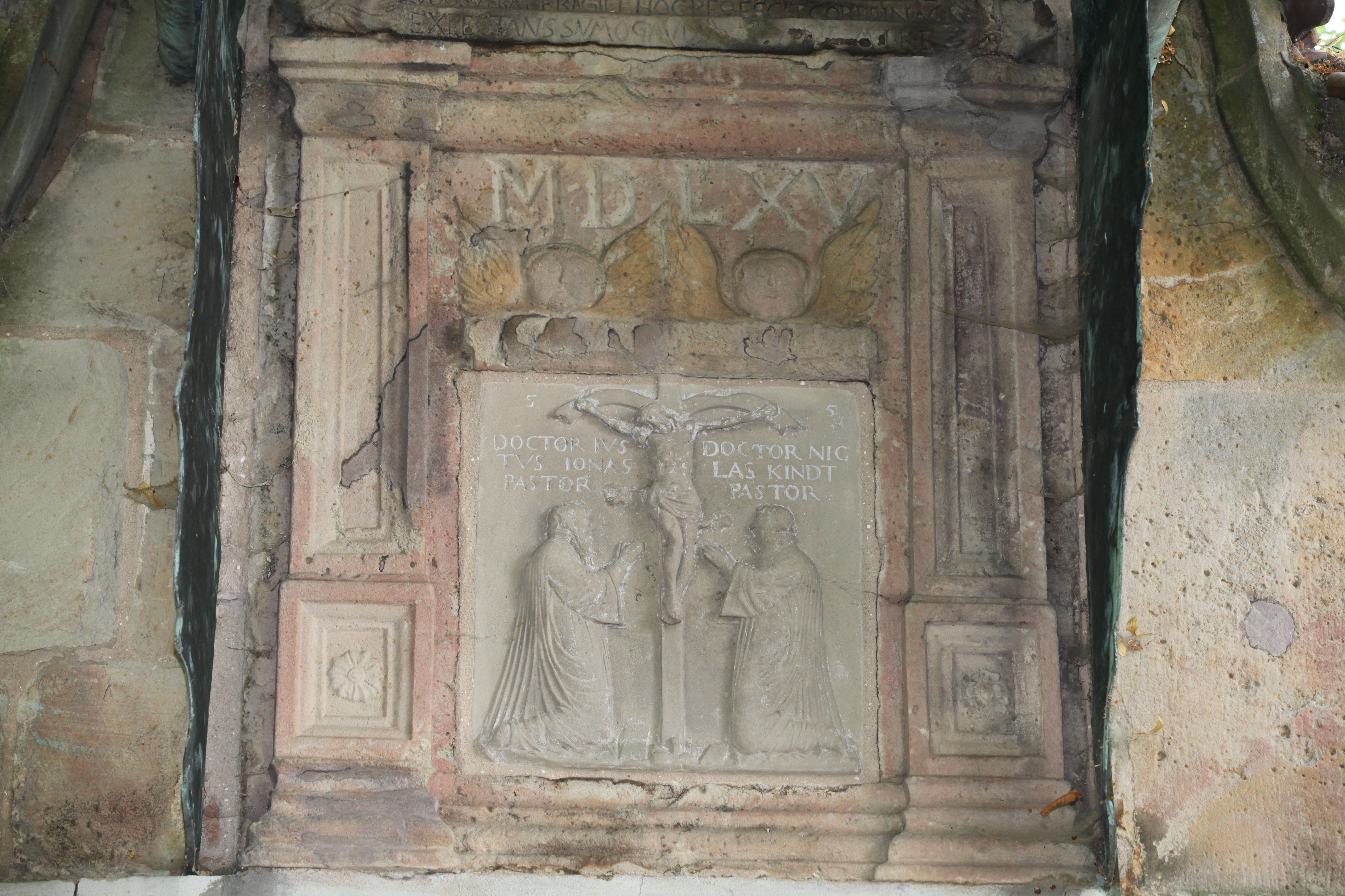 Epitaph Justus Jonas und Nikolaus Kind, Eisfeld Gottesackerkirche St. Salvator